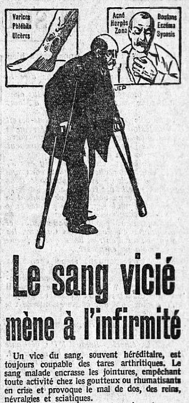 Le sang vicié (mars 1928) - publicité pour le dépuratif L. Richelet.